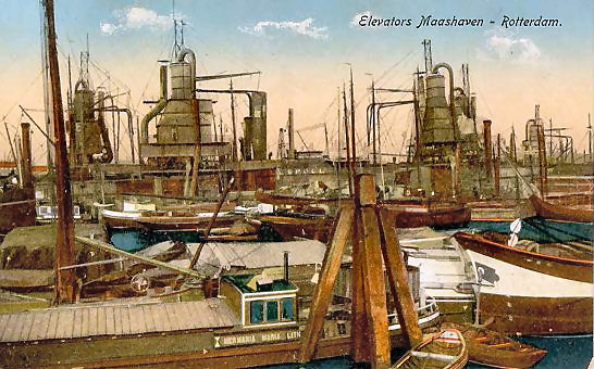 Graanelevatoren in de Maashaven, foto van ansichtkaart uit 1917, fotograaf onbekend.